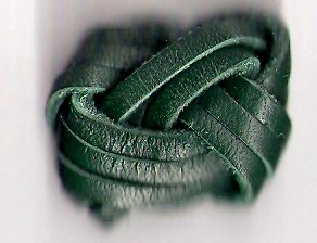 Suwak funkcyjny noszony na sznurze funkcyjnym